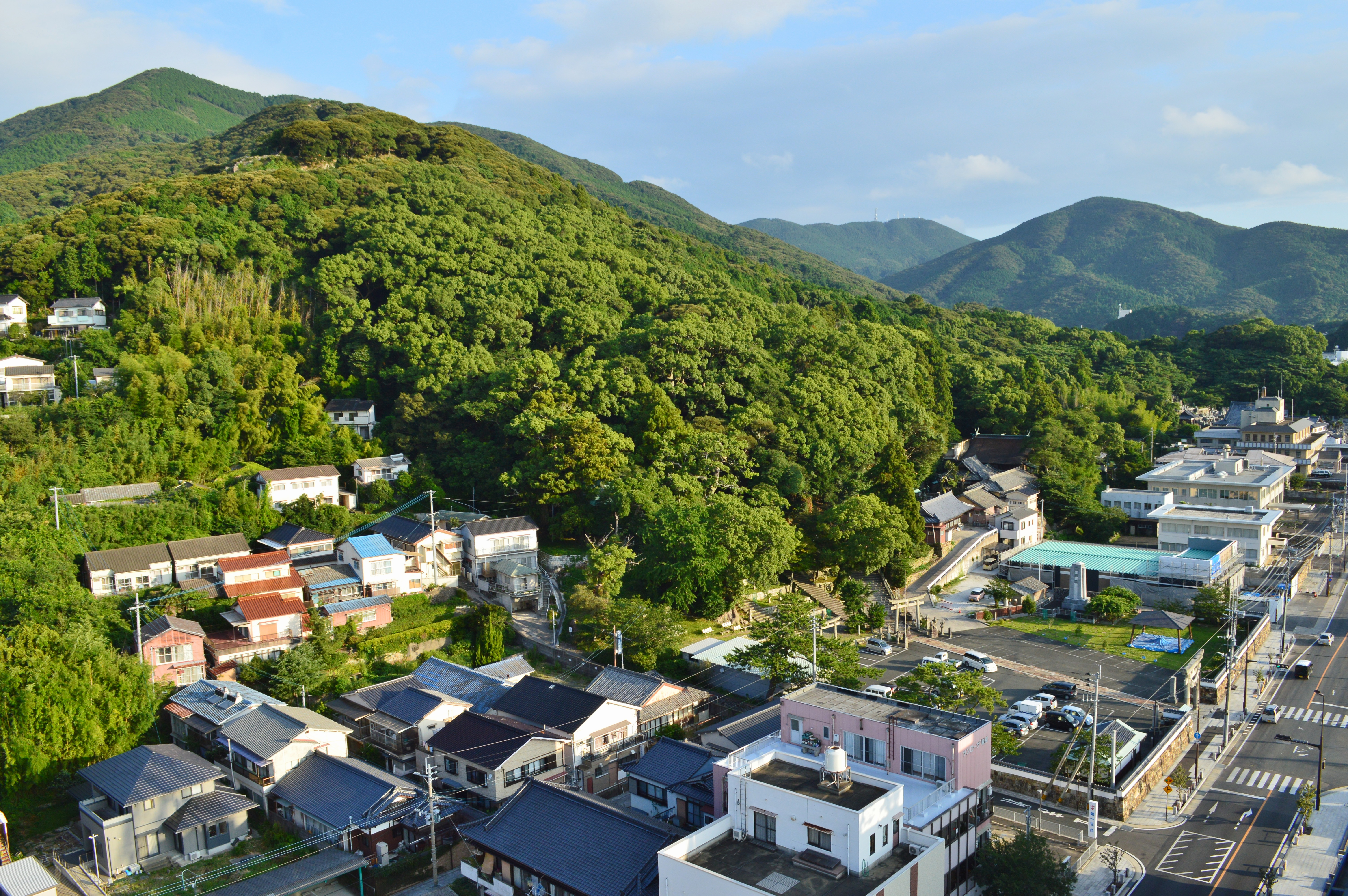 厳原八幡宮神社 境内遠景と清水山